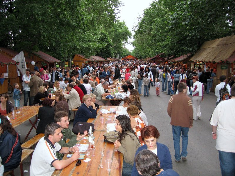 Borfesztivál Szegeden a Széchenyi téren